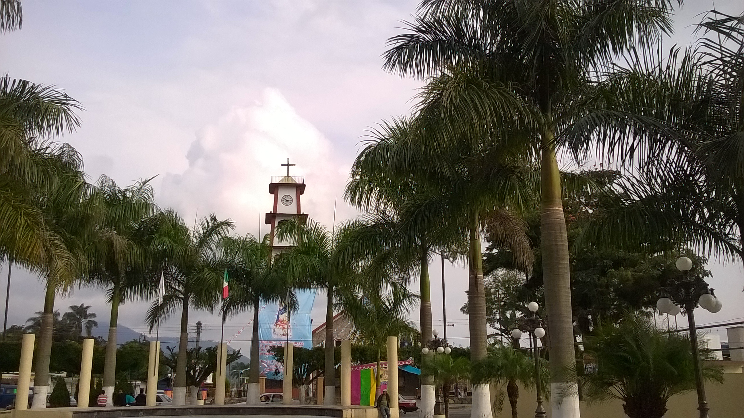 Parque de Ixtaczoquitlán, Veracruz